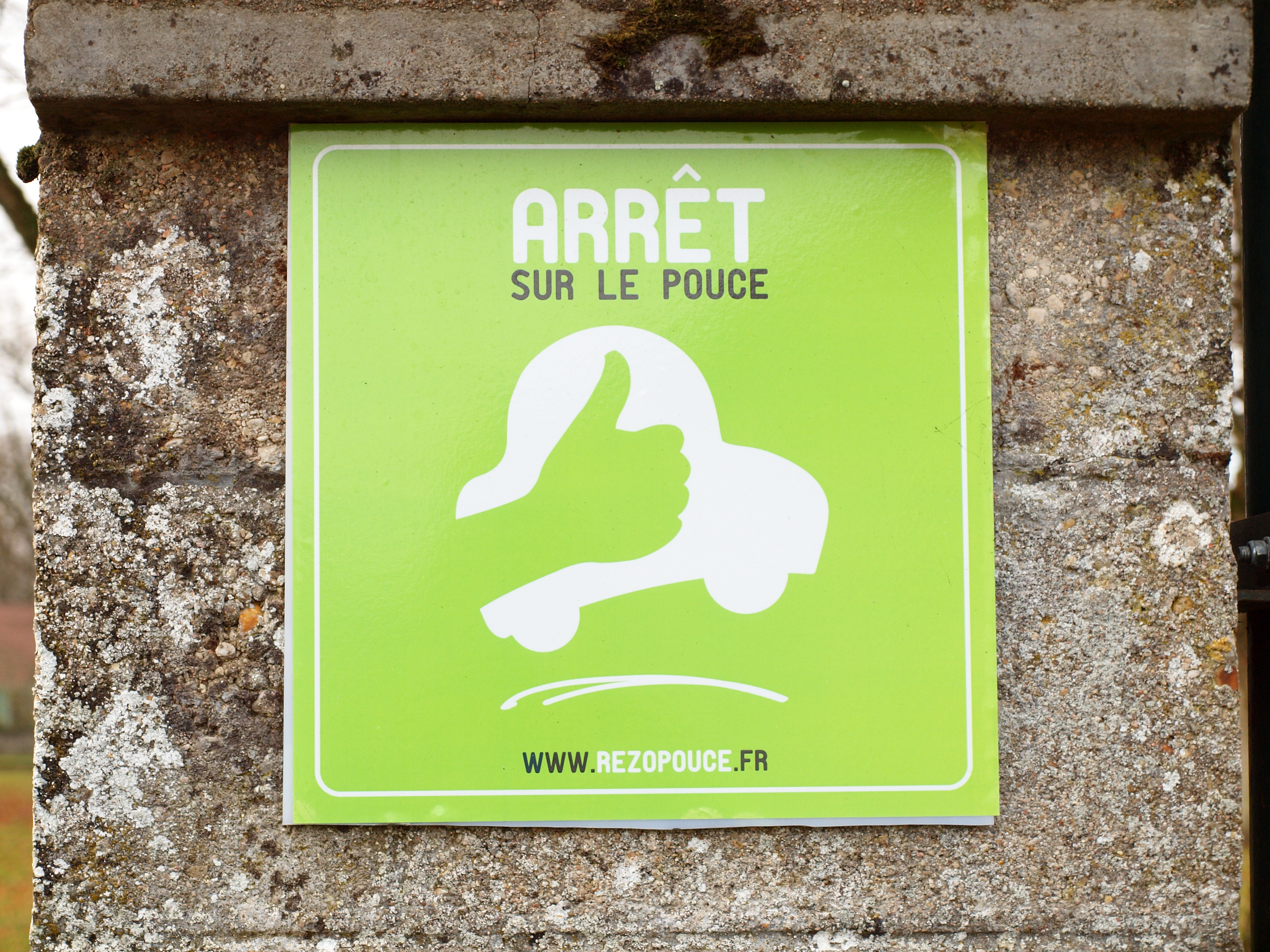 Rumont (Seine-et-Marne, France)